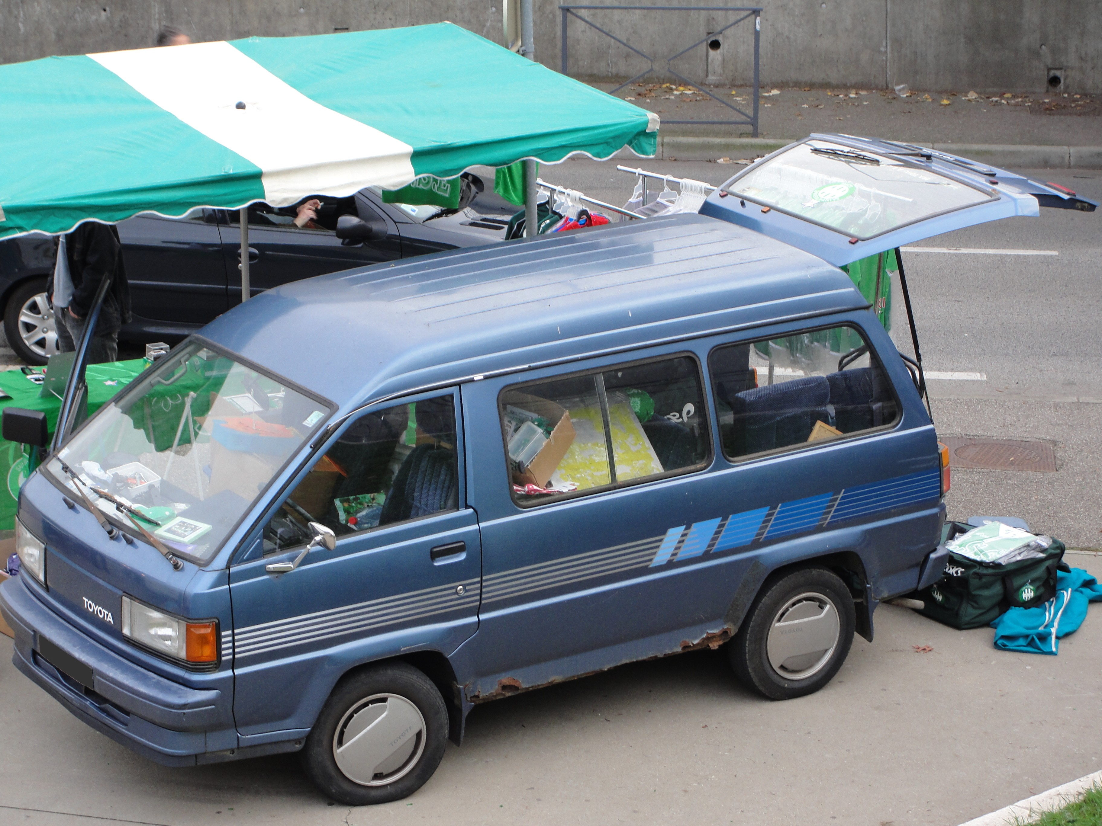 Toyota Lite Ace KM30 dans une ville française - millésime inconnu